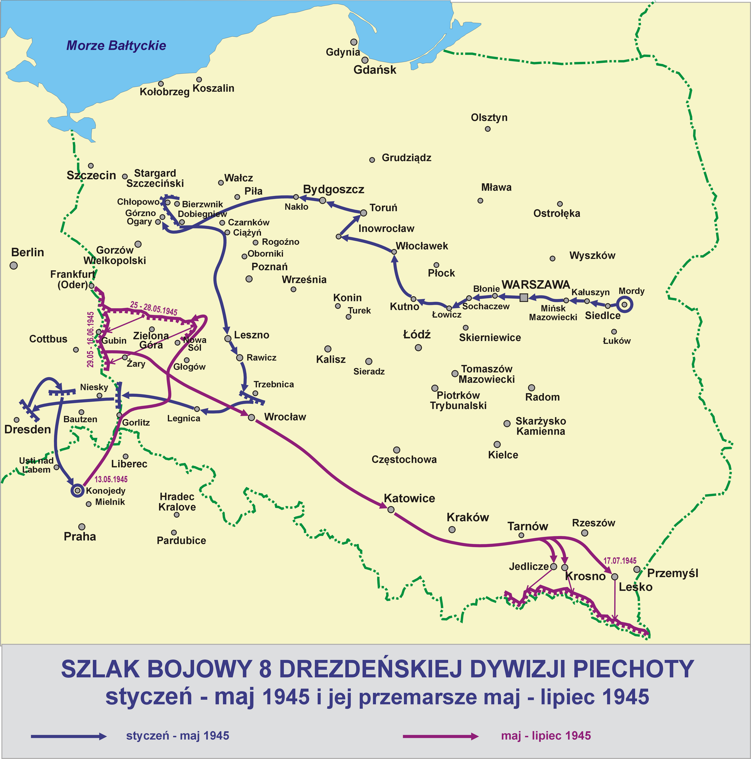 Szlak bojowy 8 Drezdeńskiej Dywizji Piechoty styczeń - maj 1945 i jej przemarsze maj - lipiec 1945